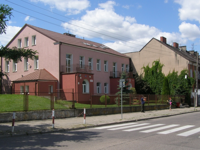 Grajewo - Sąd Rejonowy przy ulicy Kolejowej (w okresie II RP Hotel Polski)